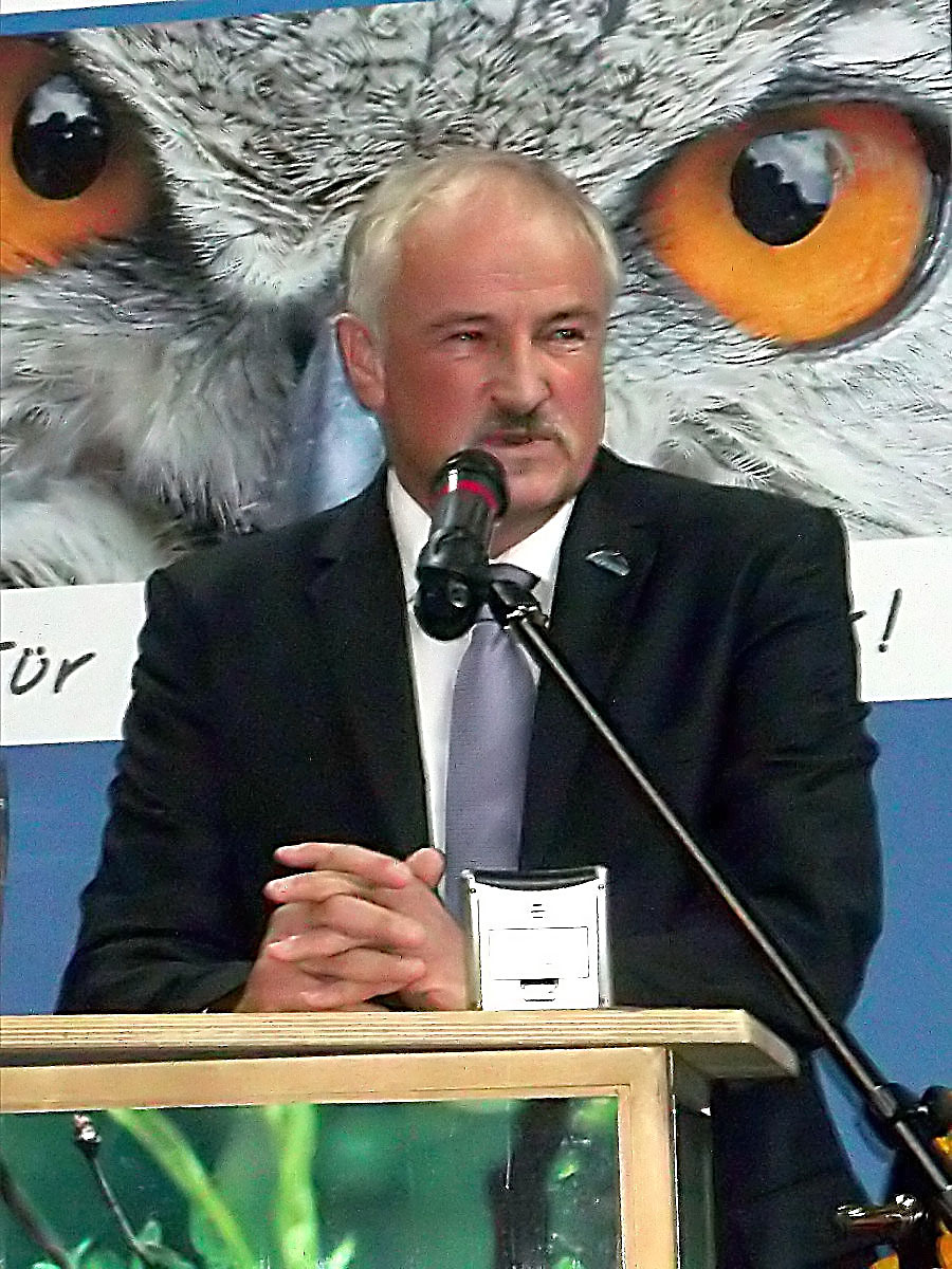 NABU-Präsident Olaf Tschimpke auf der Landesvertreterversammlung des NABU Niedersachsen 2014.